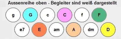 Tastenbelegung Garmon Bass alte Instrumente